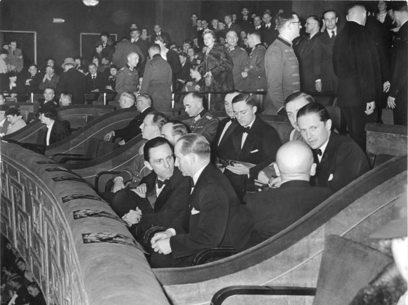 ADN-ZB/Archiv Im faschistischen Deutschland 1938 Reichspropagandaminister Dr. Goebbels während einer Veranstaltung am 19. Januar 1938 im Ufa-Palast am Zoo in Berlin, hinten rechts Reichsfilmdramaturg von Demandowsky. [Scherl Bilderdienst]